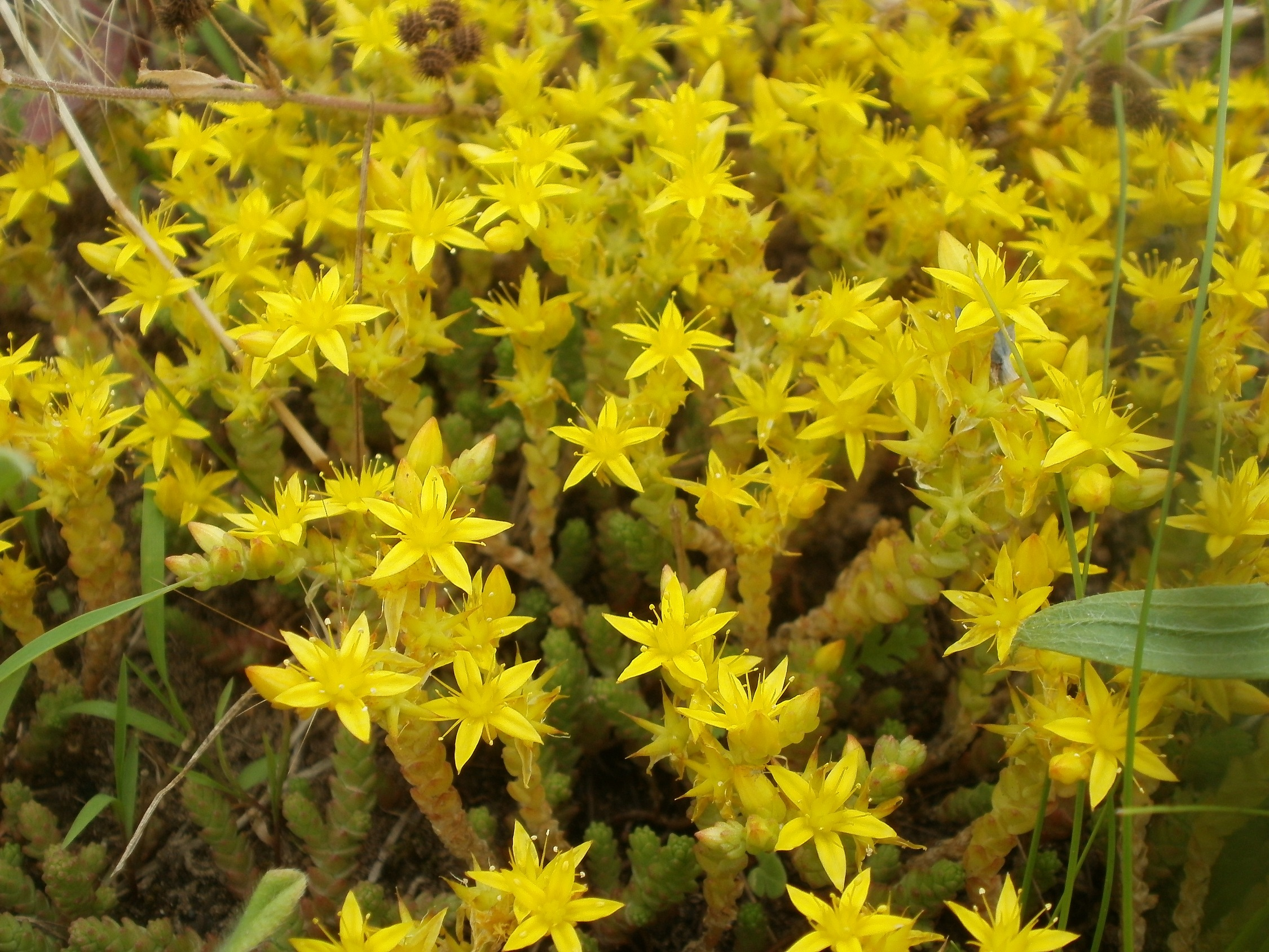 Scharfer Mauerpfeffer (Sedum acre) an den Oftersheimer Dünen